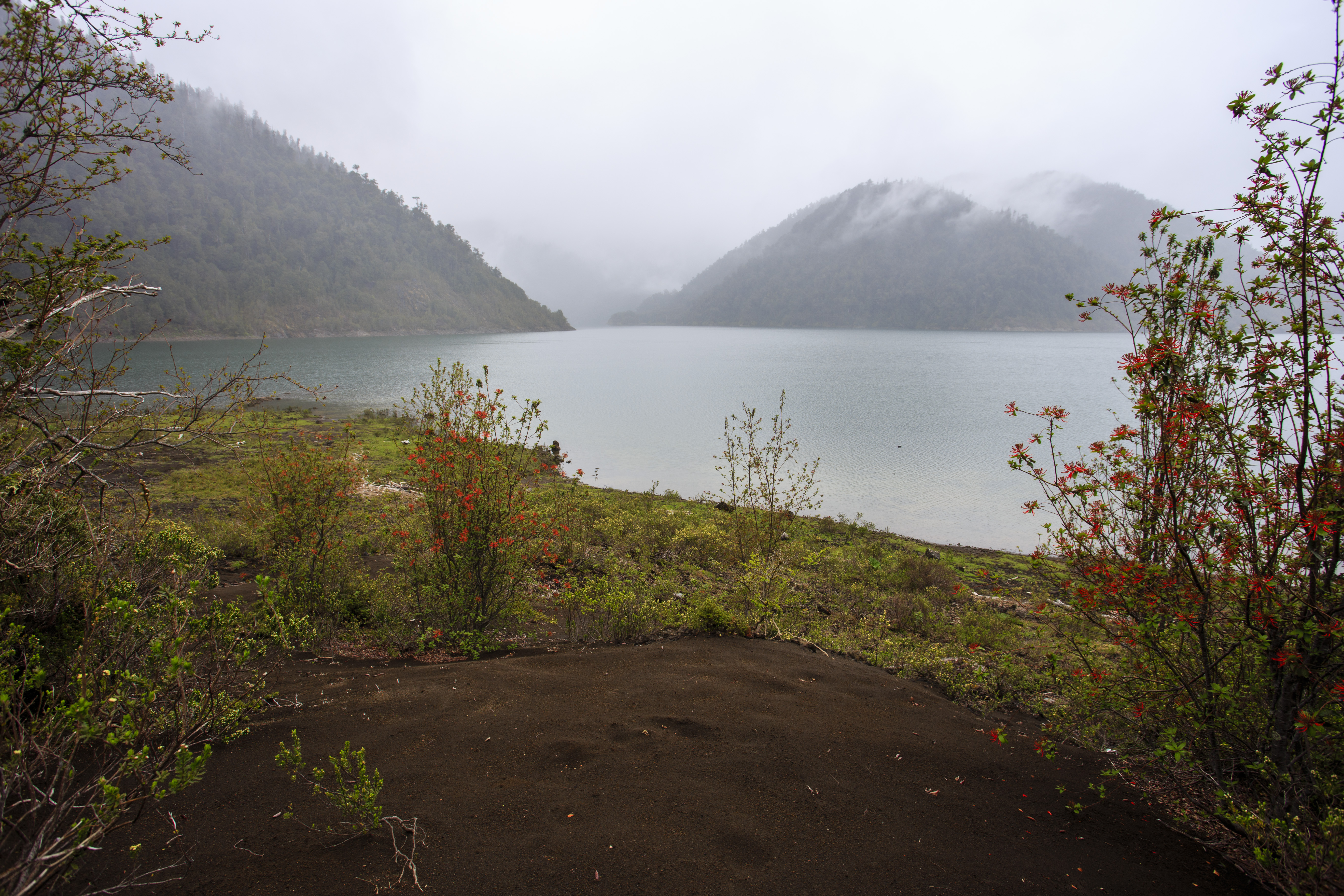 Lago Cabrera, Hualaihué, Chile.